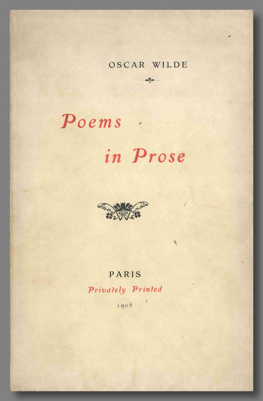 Обкладинка збірки "Поезії у прозі" 1905 року